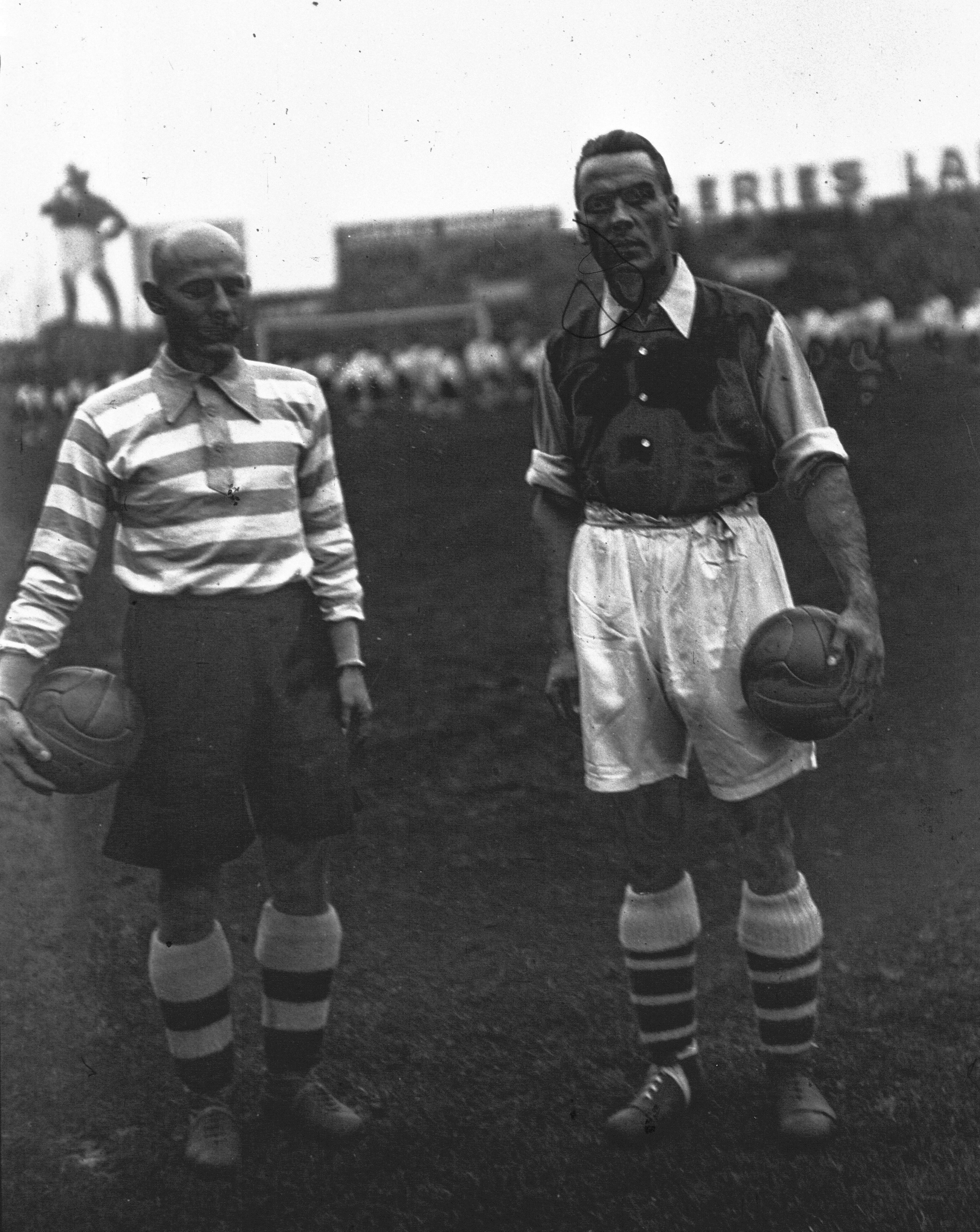 photo des capitaines d'Arsenal et du Racing Club de France lors d'un match de gala entre les deux équipes en 1934.